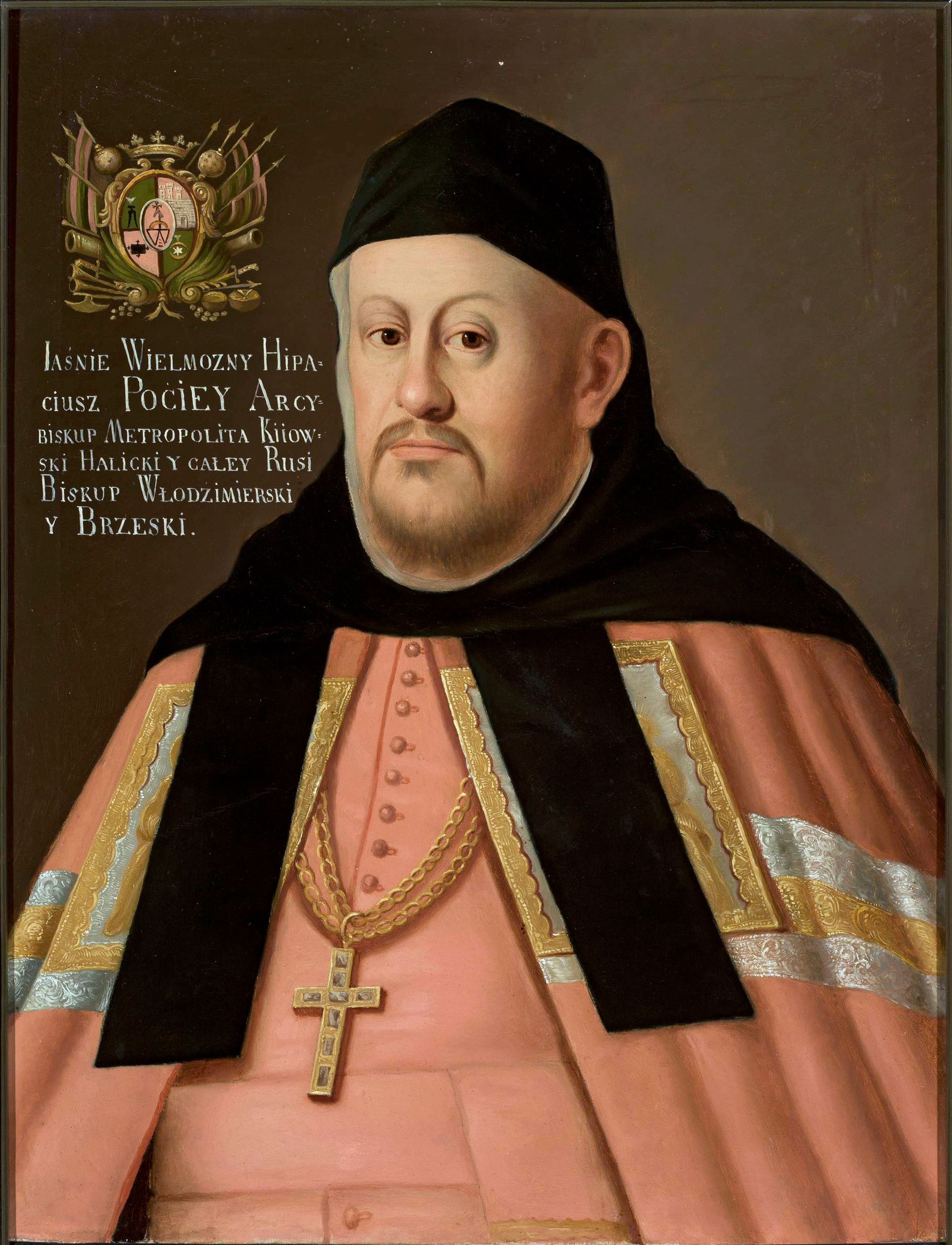 Беларуская (тарашкевіца): Іпаці Пацей